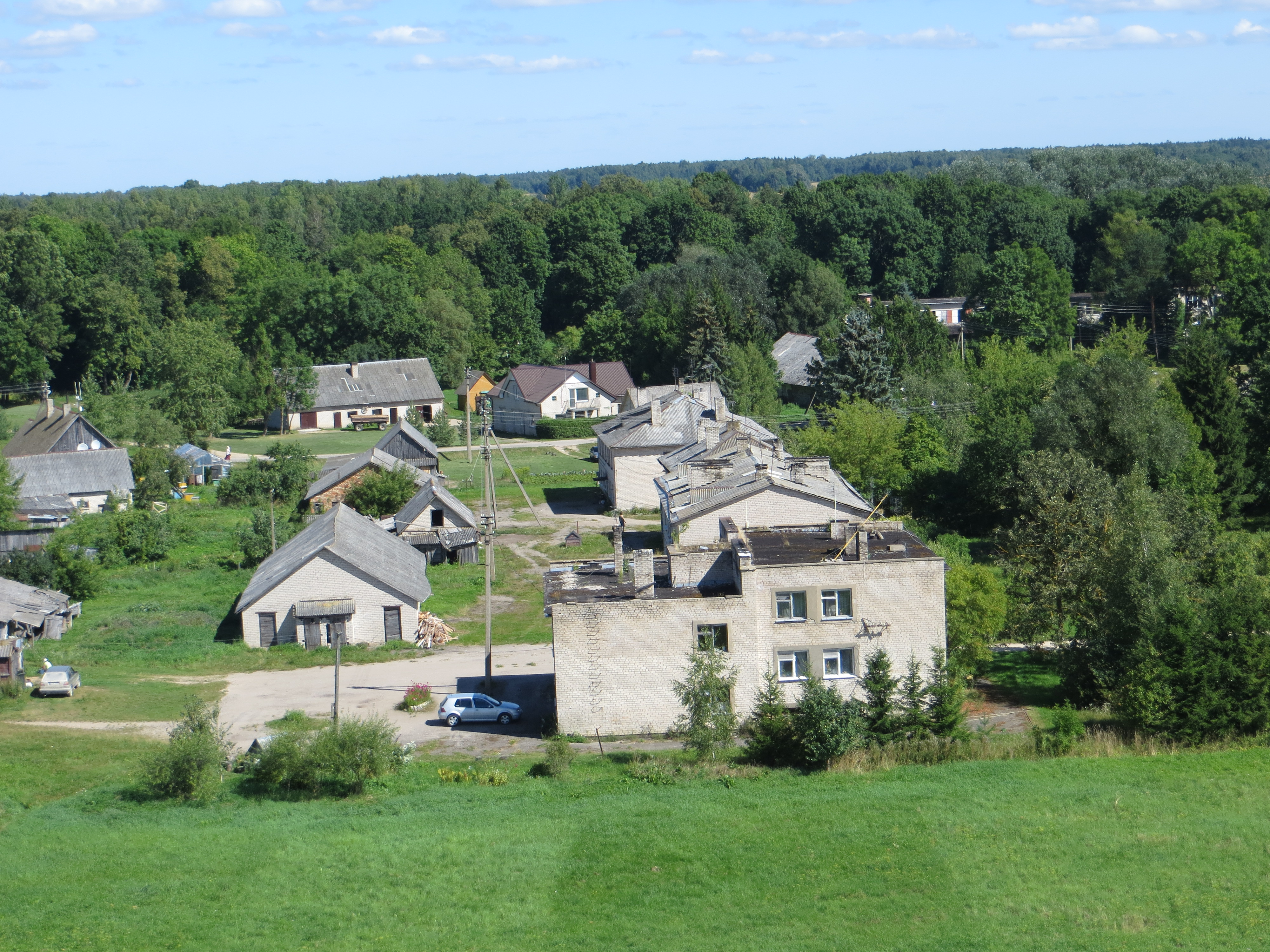 Panemunėlis, Lithuania